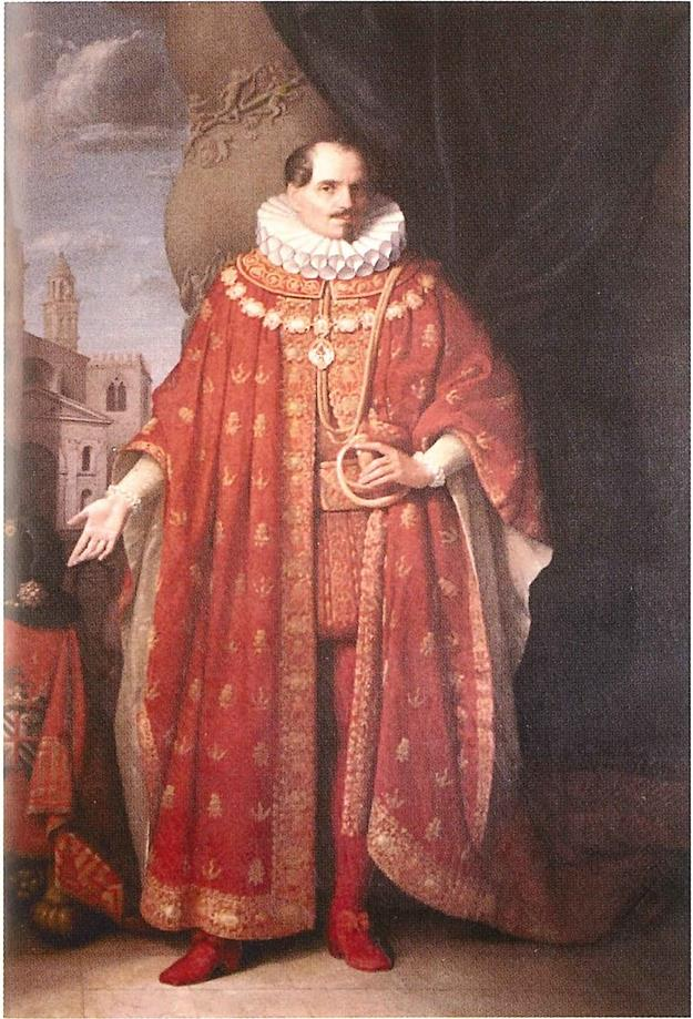 Dipinto del Marchese Ferdinando Cavriani con le Vesti dell' Ordine del Redentore